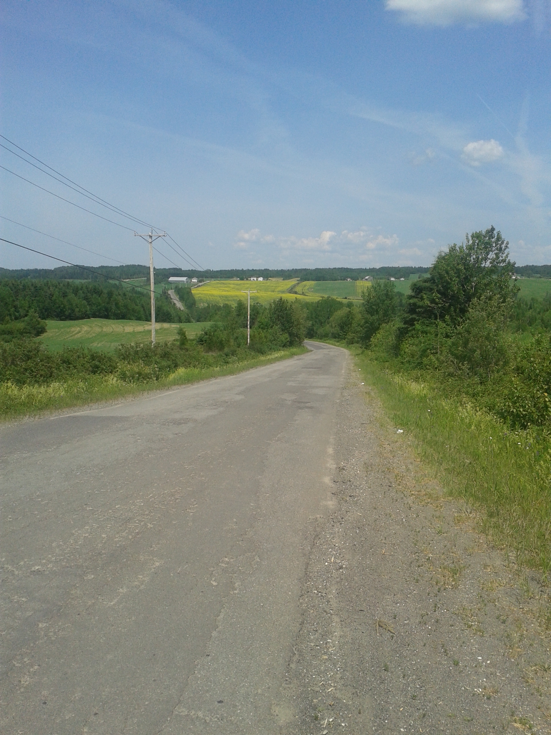 St-Cyprien-de-Rivière-du-Loup. Chemin en direction de Ste-Rita.